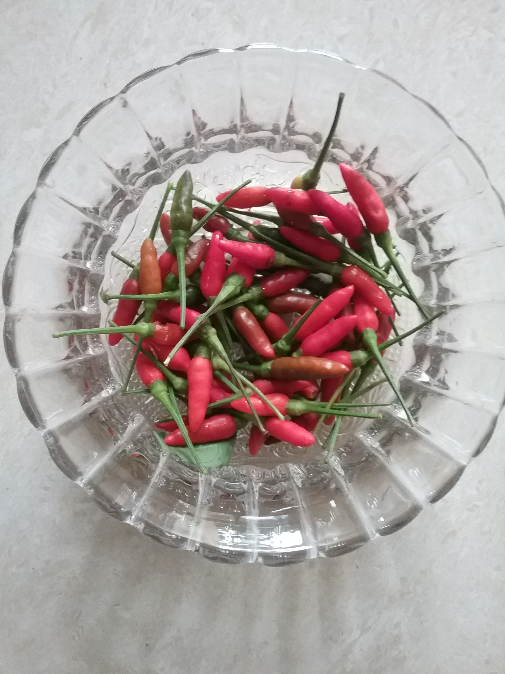 காந்தாரி மிளகாய்